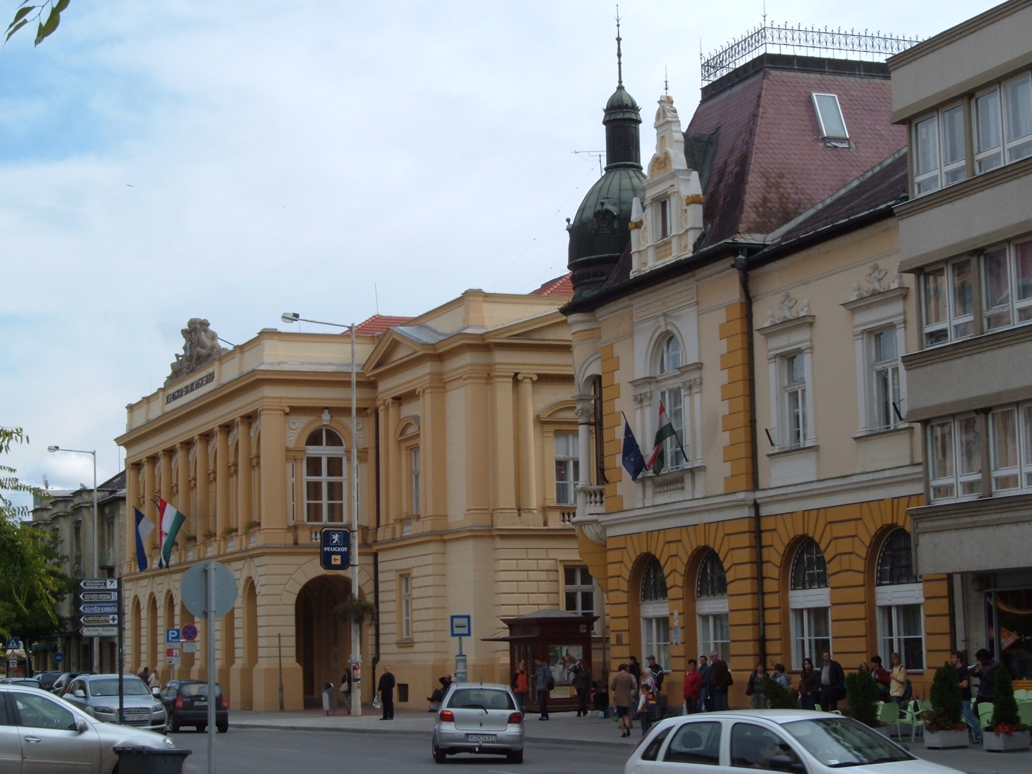 Előtérben a városi kaszinó, háttérben a Megyeháza épülete (Szolnok)